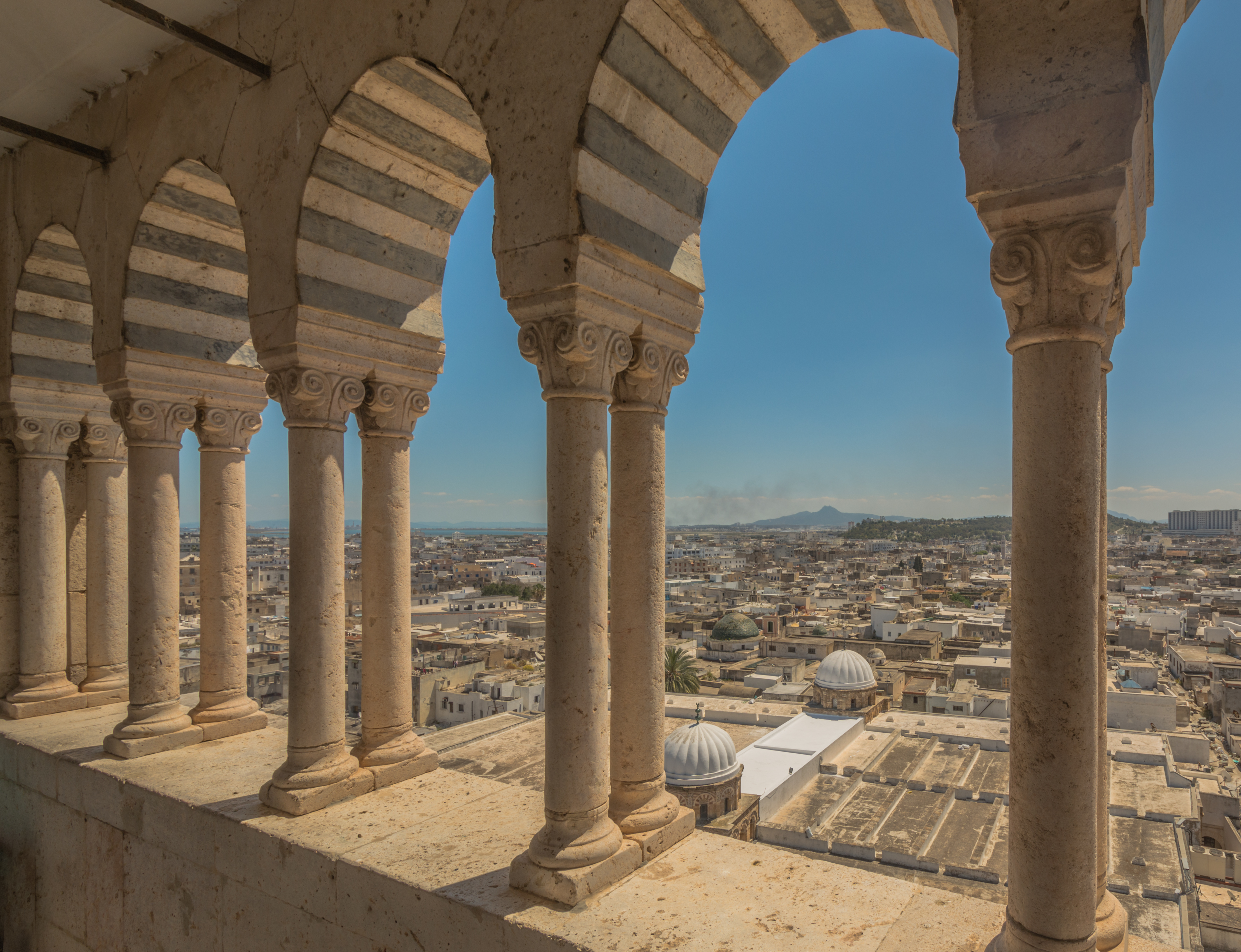 Grande Mosquée (Djamaa Zitouna) : vue du minaret